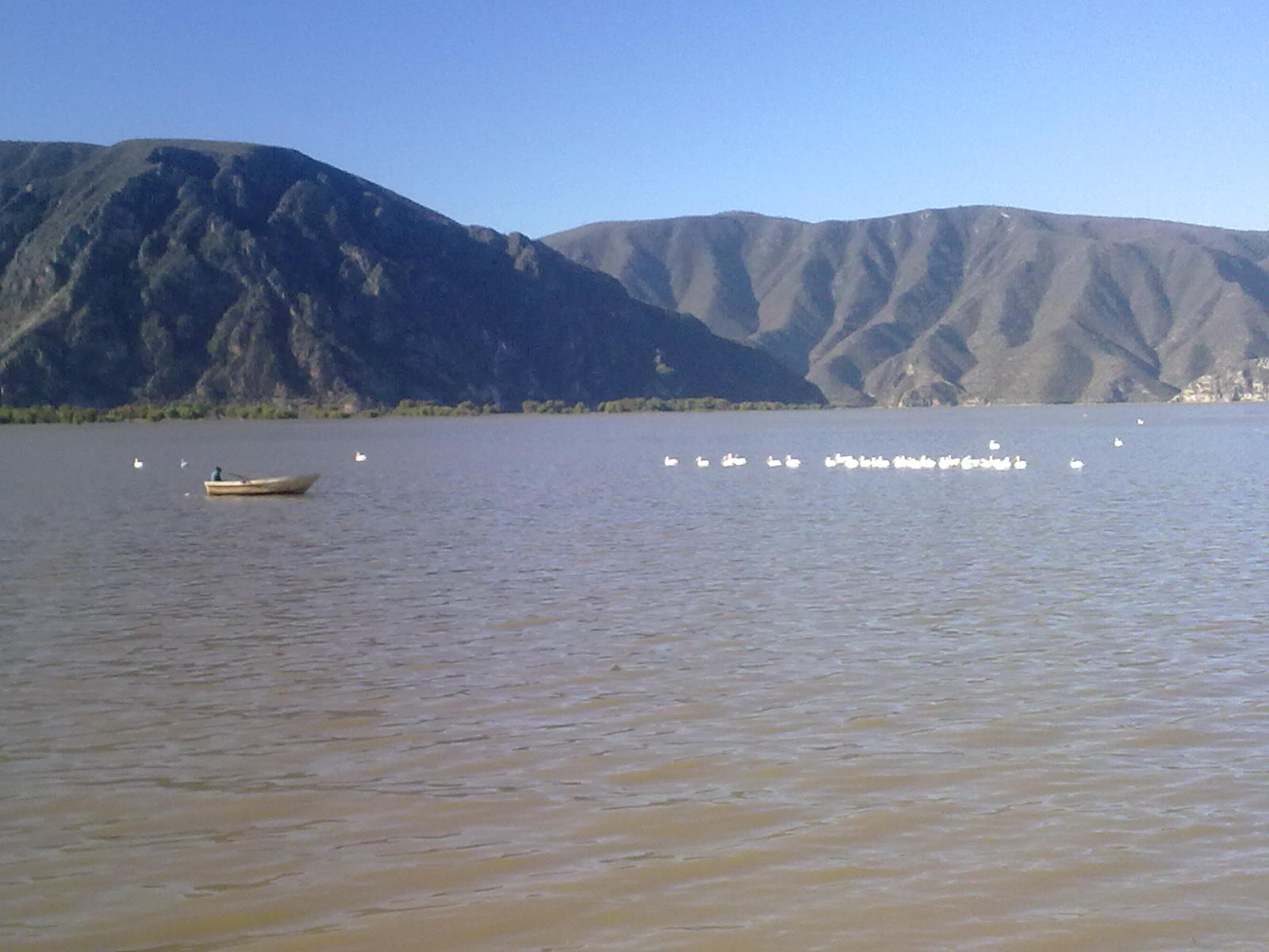 La vega Metztitlan